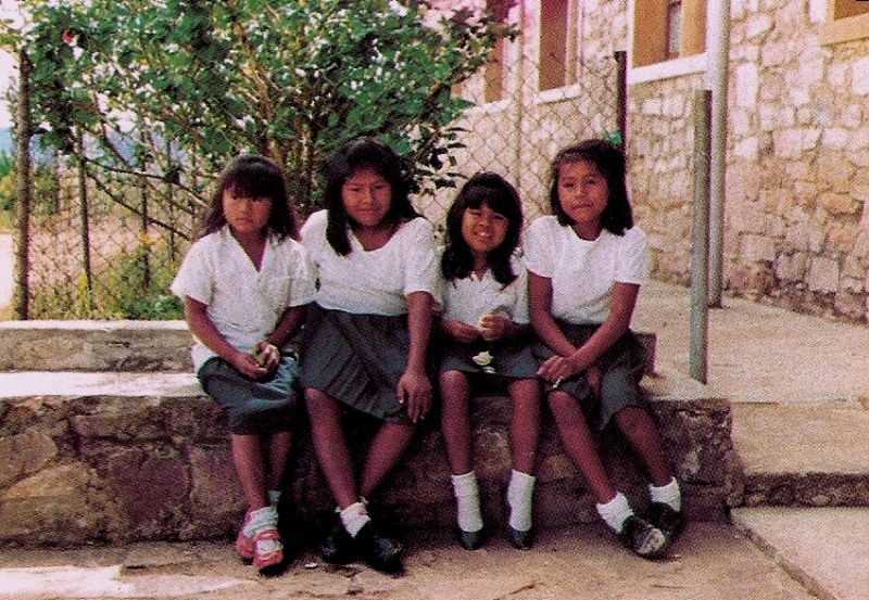 Kavanayen, en el Parque Nacional Canaima, sector oriental, estado Bolívar - Venezuela (1995)